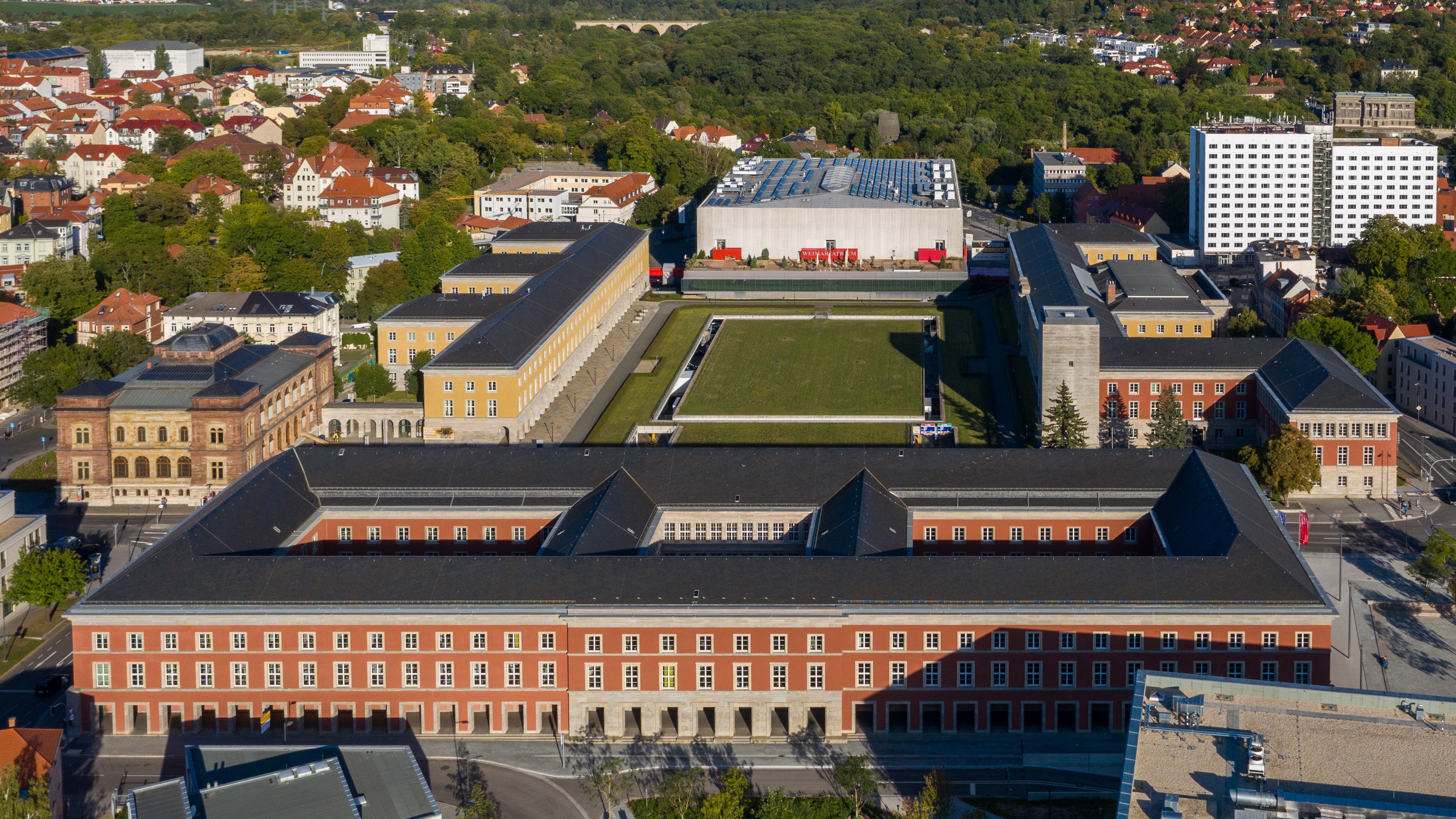 Nordflügel des Gauforums Weimar, Jorge-Semprún-Platz.